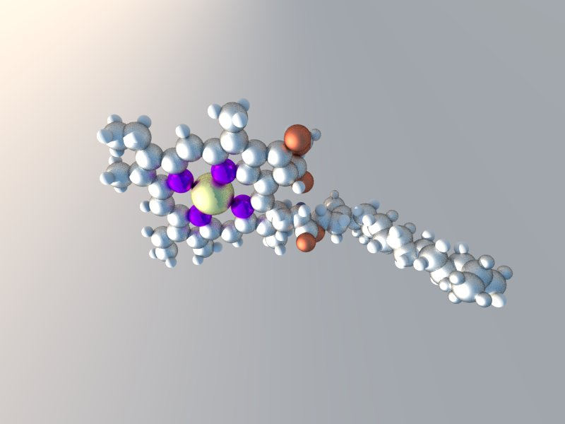 Estructura quimica de la clorofila tipo a, en azul, blanco, gris, rojo y amarillo se aprecian los atomos de nitrogeno, hidrogeno, carbono, oxigeno y magnesio, la imagen se diseño tratando de ser lo mas fidedigna al modelo, pero no esta exenta de errores.